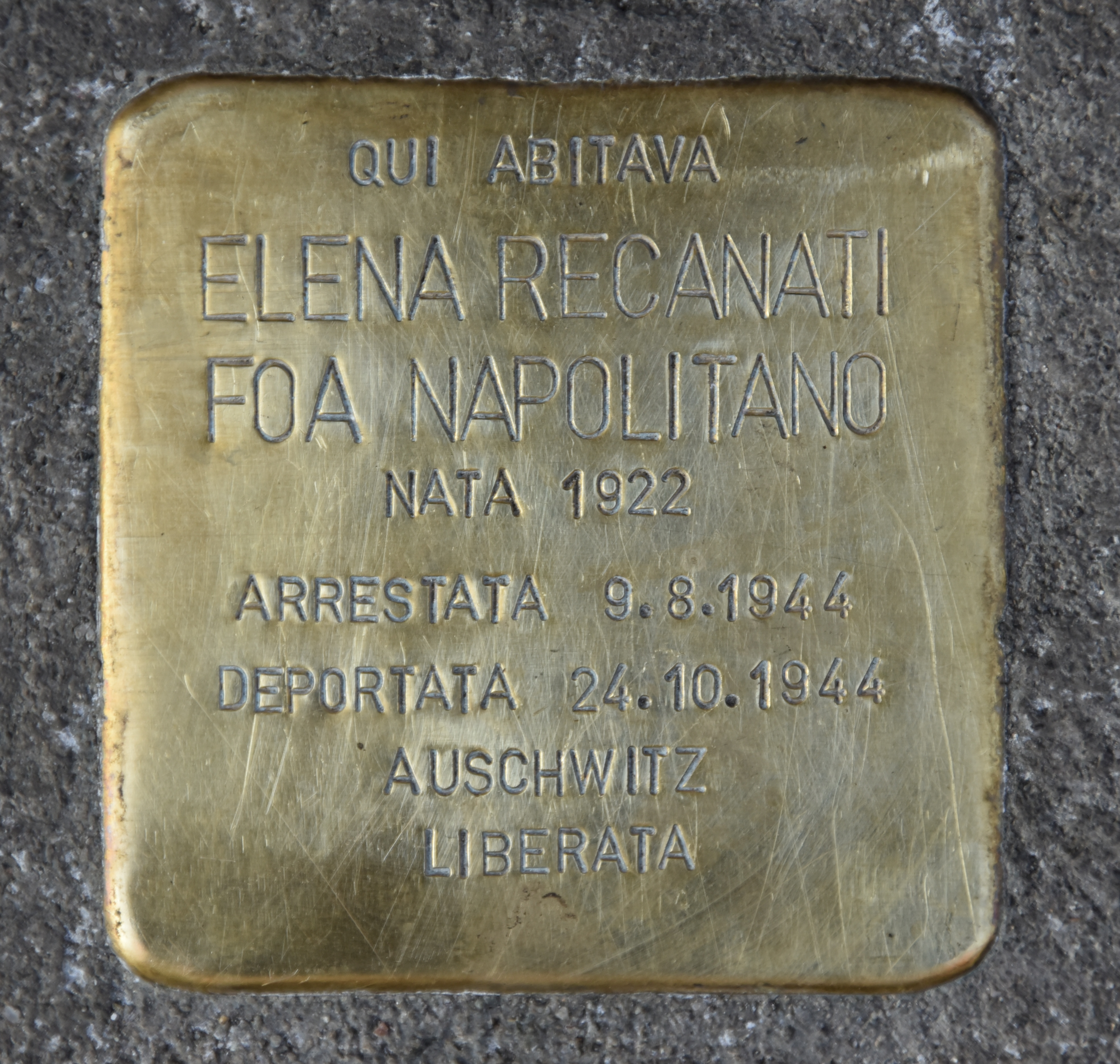 Stolperstein für Elena Recanati Foa Napolitano